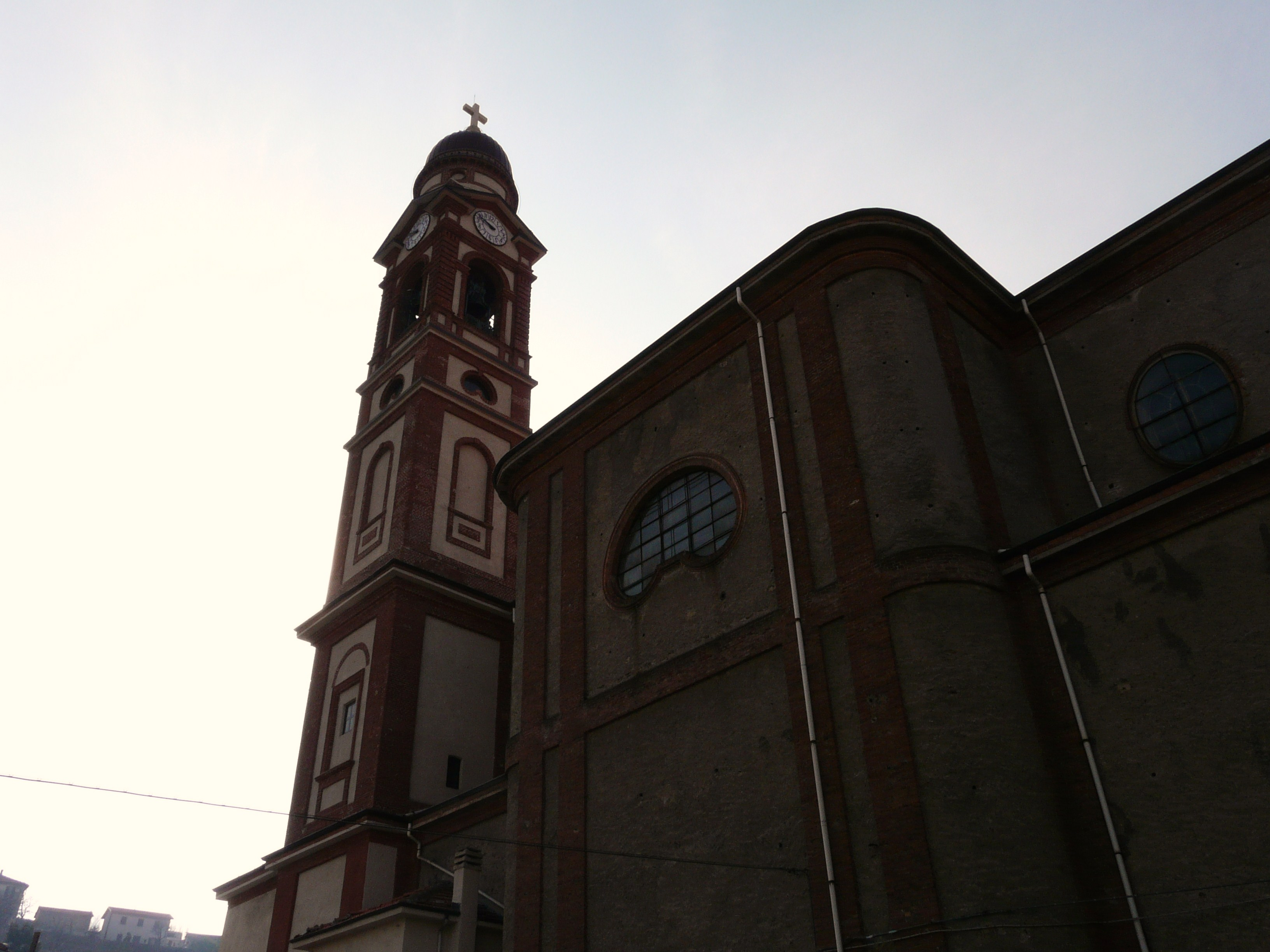 Chiesa di San Giovanni Battista, Carcare, Liguria, Italia